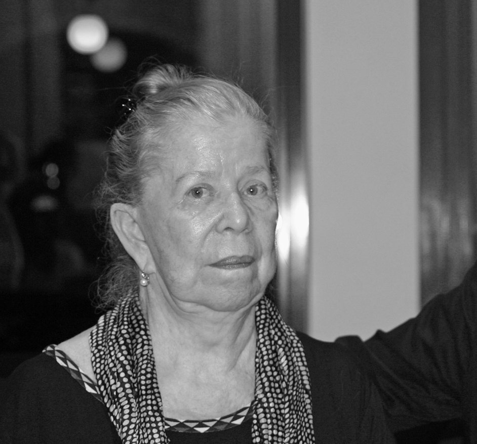 Barbara Brecht-Schall während einer Buchlesung ihrer Tochter im Literaturforum des Brecht-Hauses in Berlin.